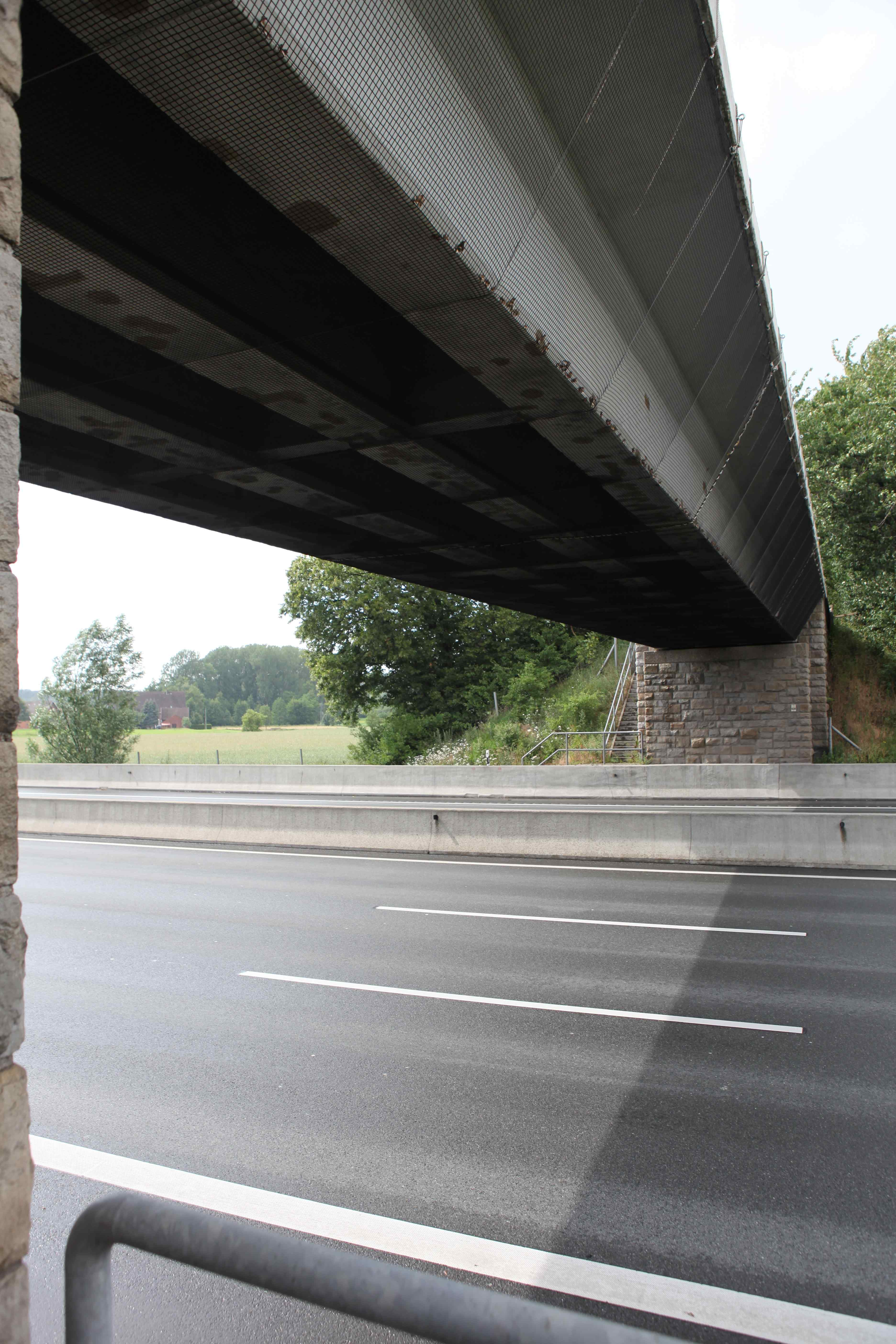 Überführung Weg Hesseler in Beckum, Nordrhein-Westfalen